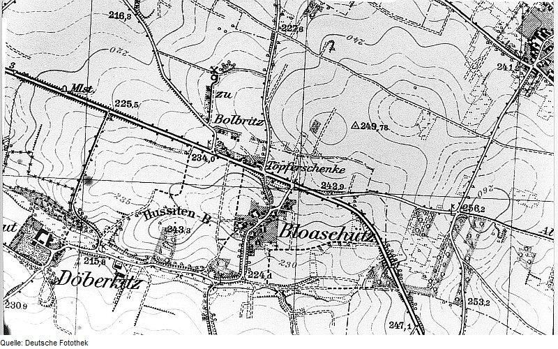 Original image description from the Deutsche Fotothek Bautzen-Bolbritz. Meßtischblatt, Sekt. Bautzen, Nr. 4852 (RA Görlitz 30/39)